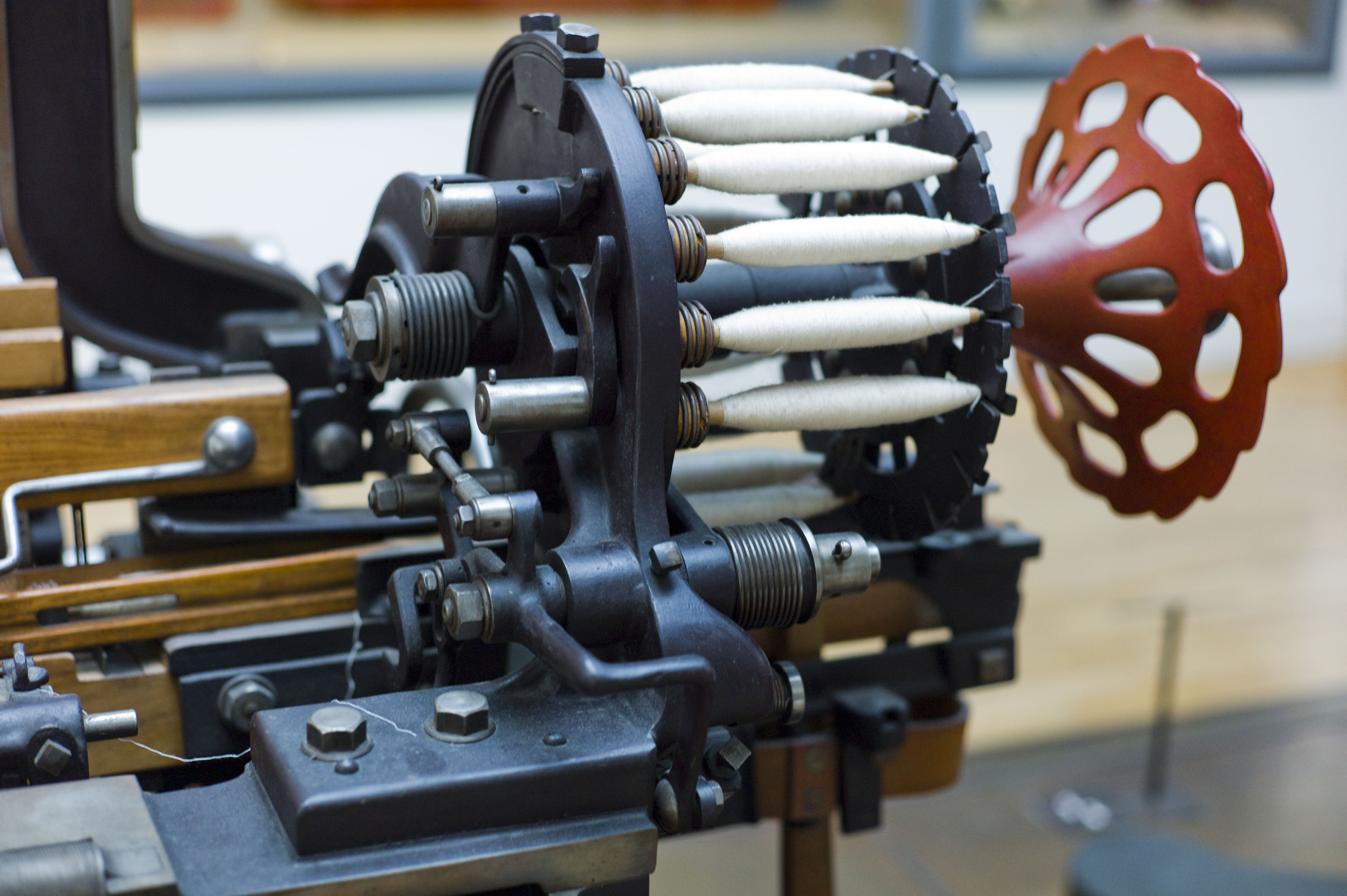 Musée des Arts et Métiers